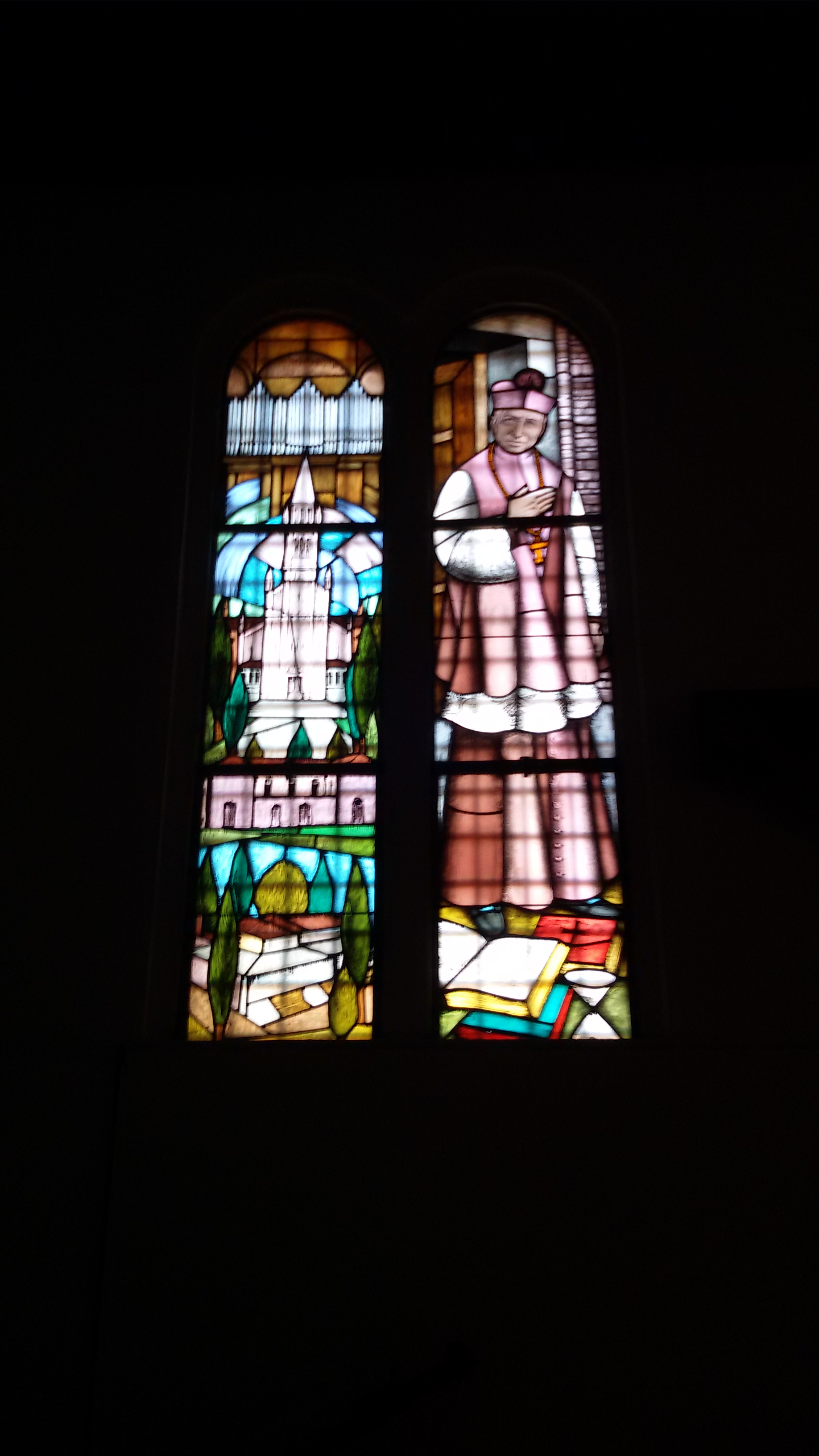 Chiesa di Santa Cristina Quinto di Treviso